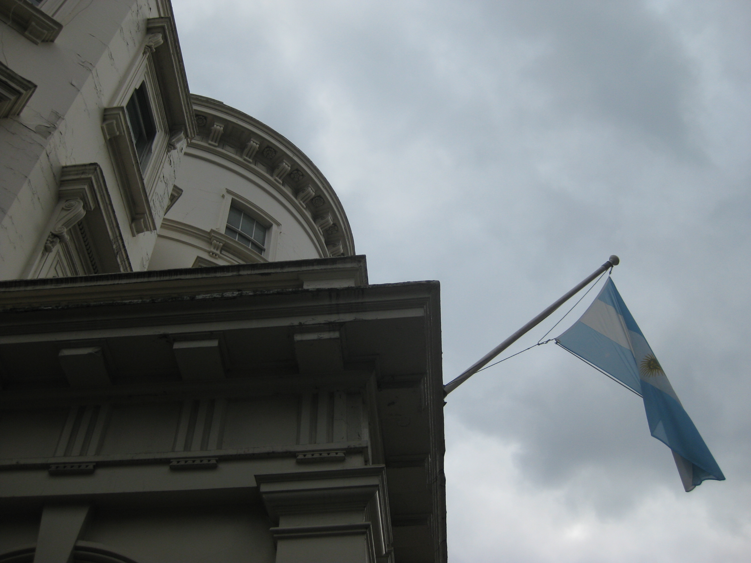 Argentine Embassy Belgrave Square, London UK